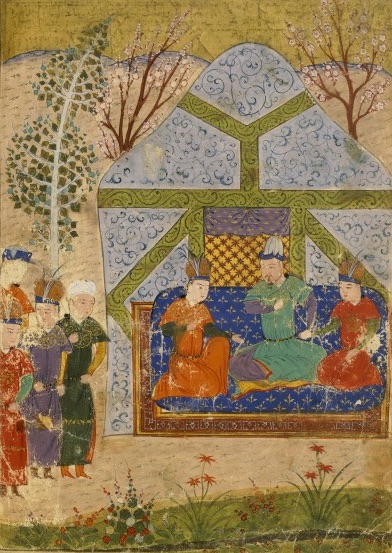 Assemblée des fils de Djengiz Khân